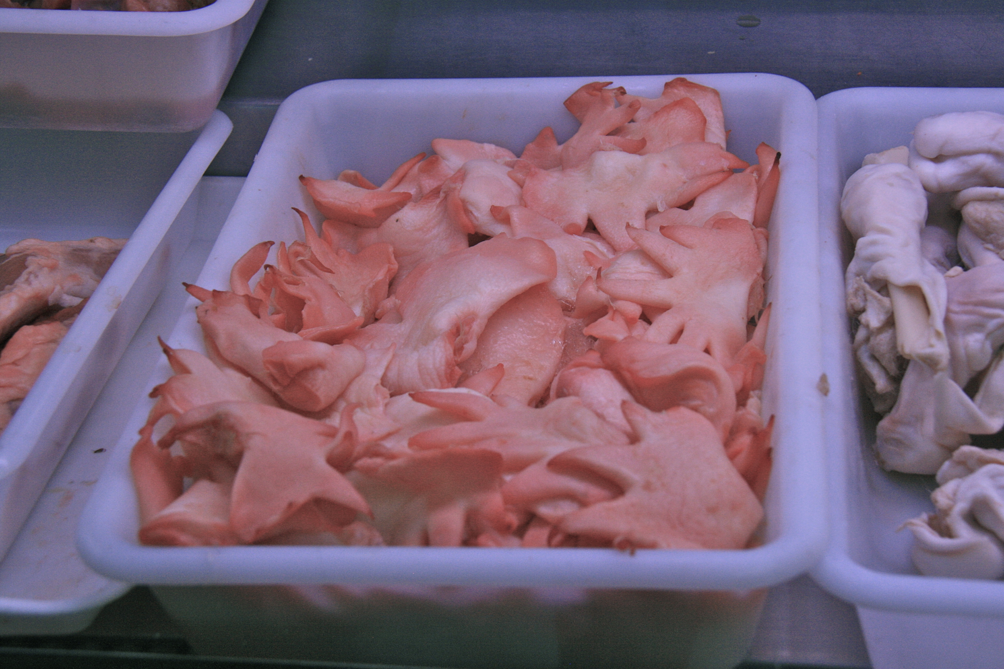 Hahnenkämme